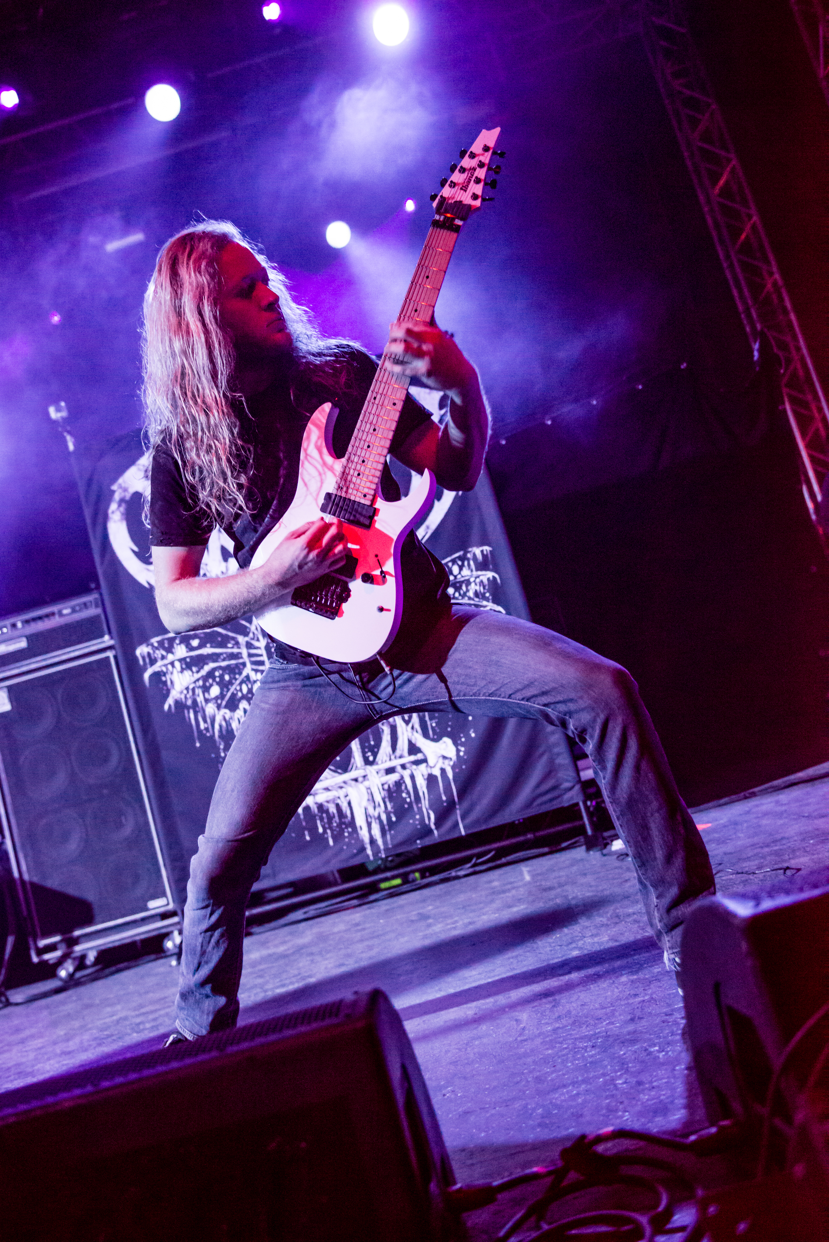 'Impericon Festival 2015; Oberhausen Turbinenhalle': 'Carnifex'